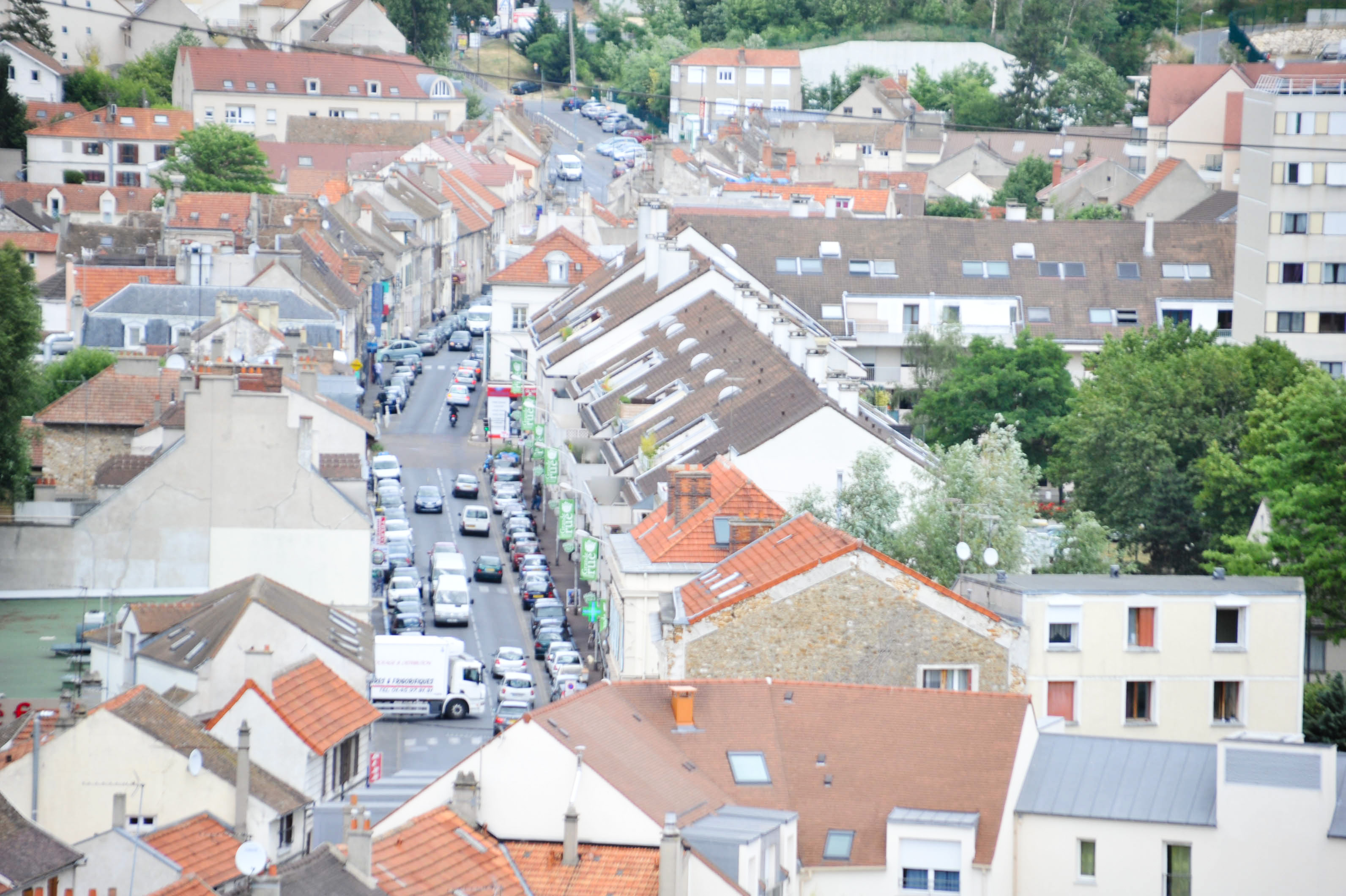 Longjumeau